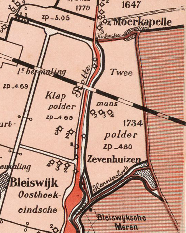 Tweemanspolder